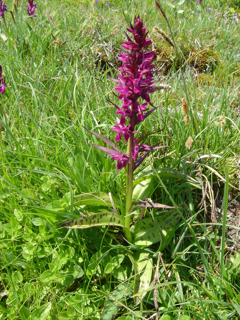 Dactylorhiza majalis subsp. alpestris